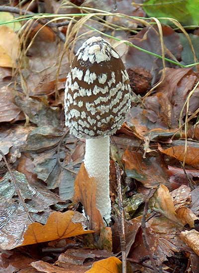 Ein Spechttintling (Coprinus picaceus) in Königsfeld (Eifel).